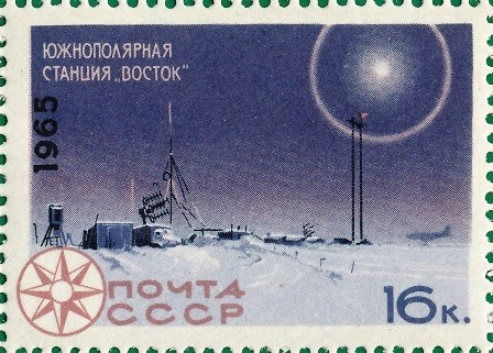 Почтовая марка СССР. 1965. Исследование Арктики и Антарктики. Южнополярная станция «Восток». Номер в каталоге ЦФА 3271. Тираж — 3 млн экз.